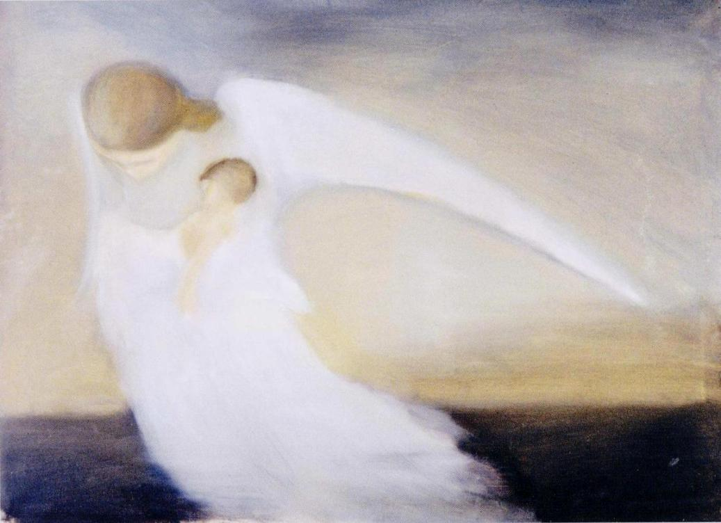 Einar Ilmonin maalaus. Kuuluu yksityiskokoelmaan.